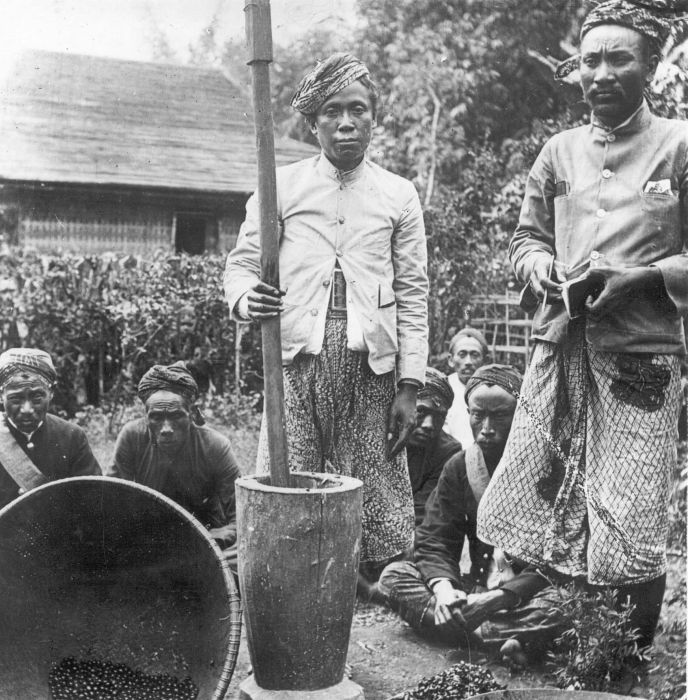 Repronegatief. Het pellen van koffiebessen met behulp van een houten stamper, Preanger, West-Java